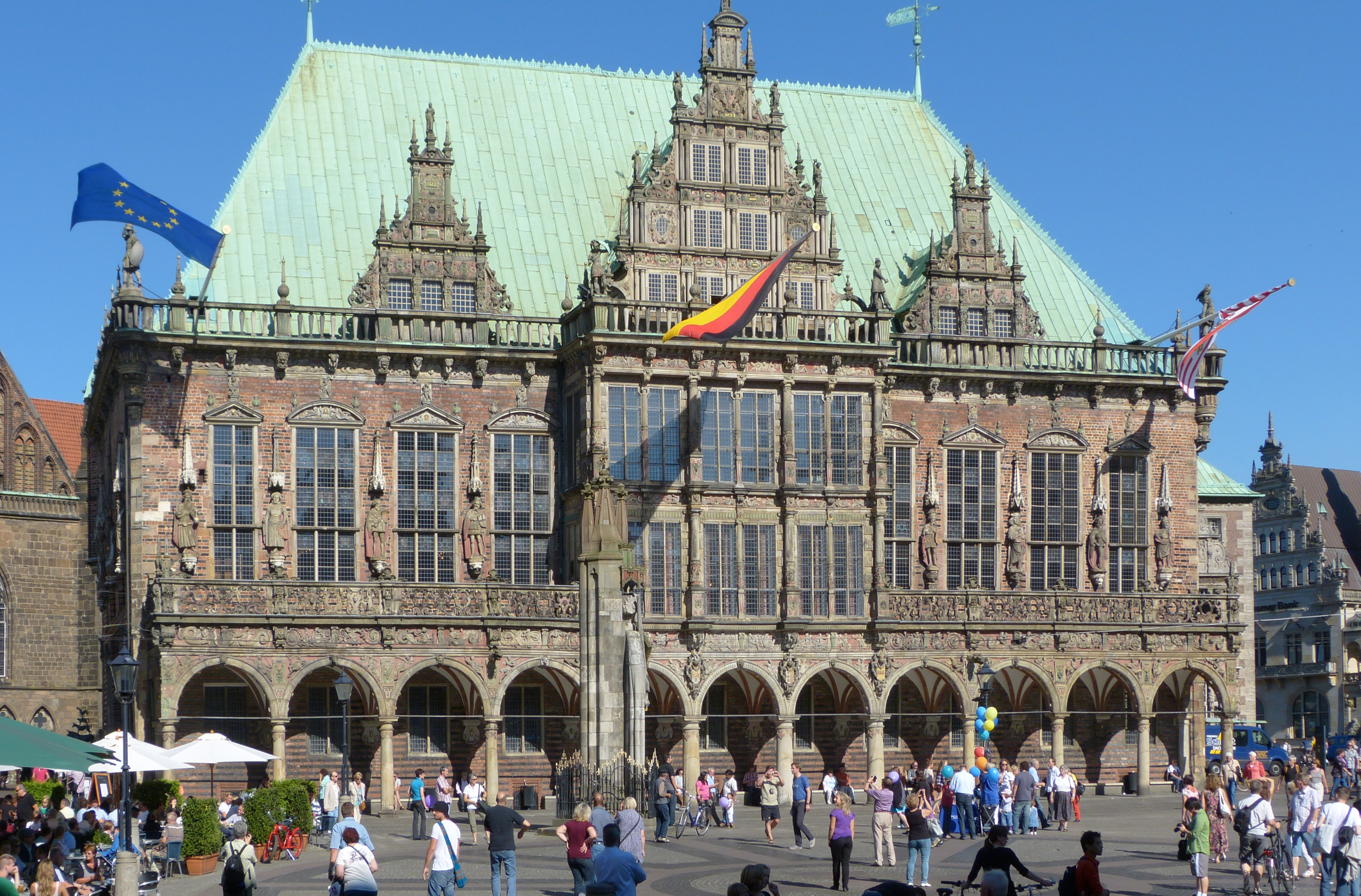 Rathaus in Bremen, Tag des offenen Denkmals 2012Das abgebildete Objekt ist ein geschütztes Kulturdenkmal in der Freien Hansestadt Bremen, mit der Nr. 0066,T001 beim Landesamt für Denkmalpflege registriert.